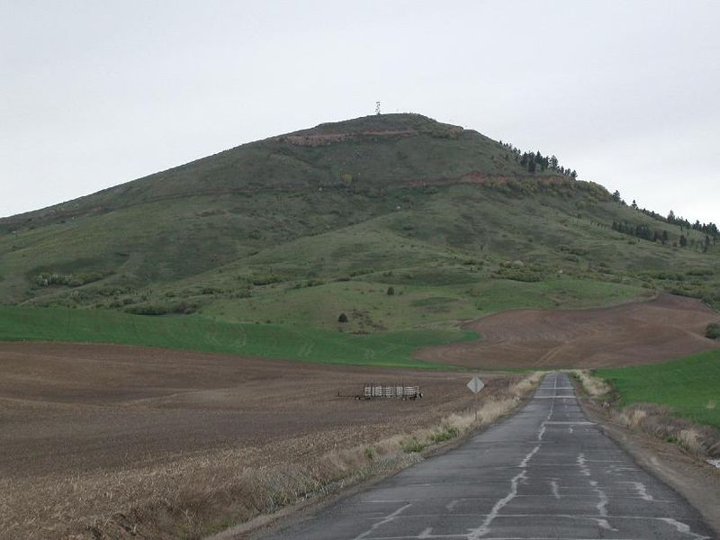 Un fóto de Steptoe Butte de 4 Mayo 2003.